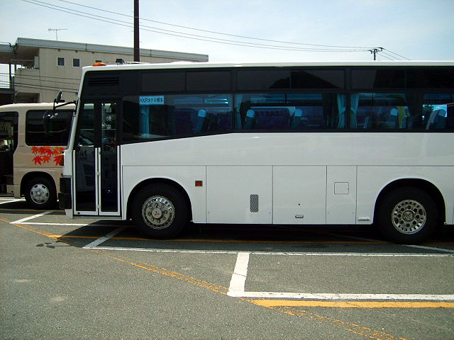 1982~1985 Mitsubishi Aero Midi